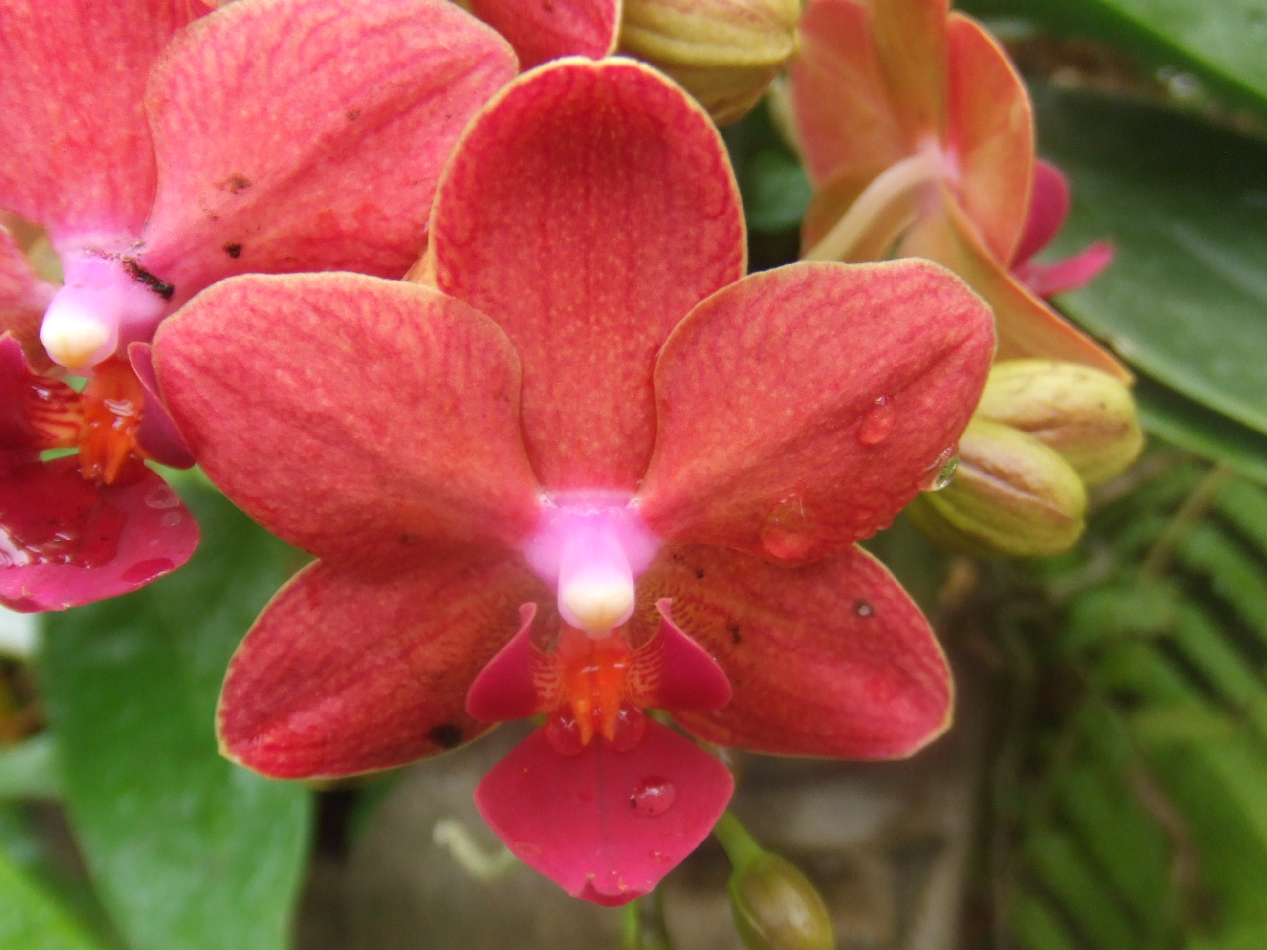 Ongeïdentificeerde orchidee (Phalaenopsis - Cultivar), Botanische Tuin TU Delft